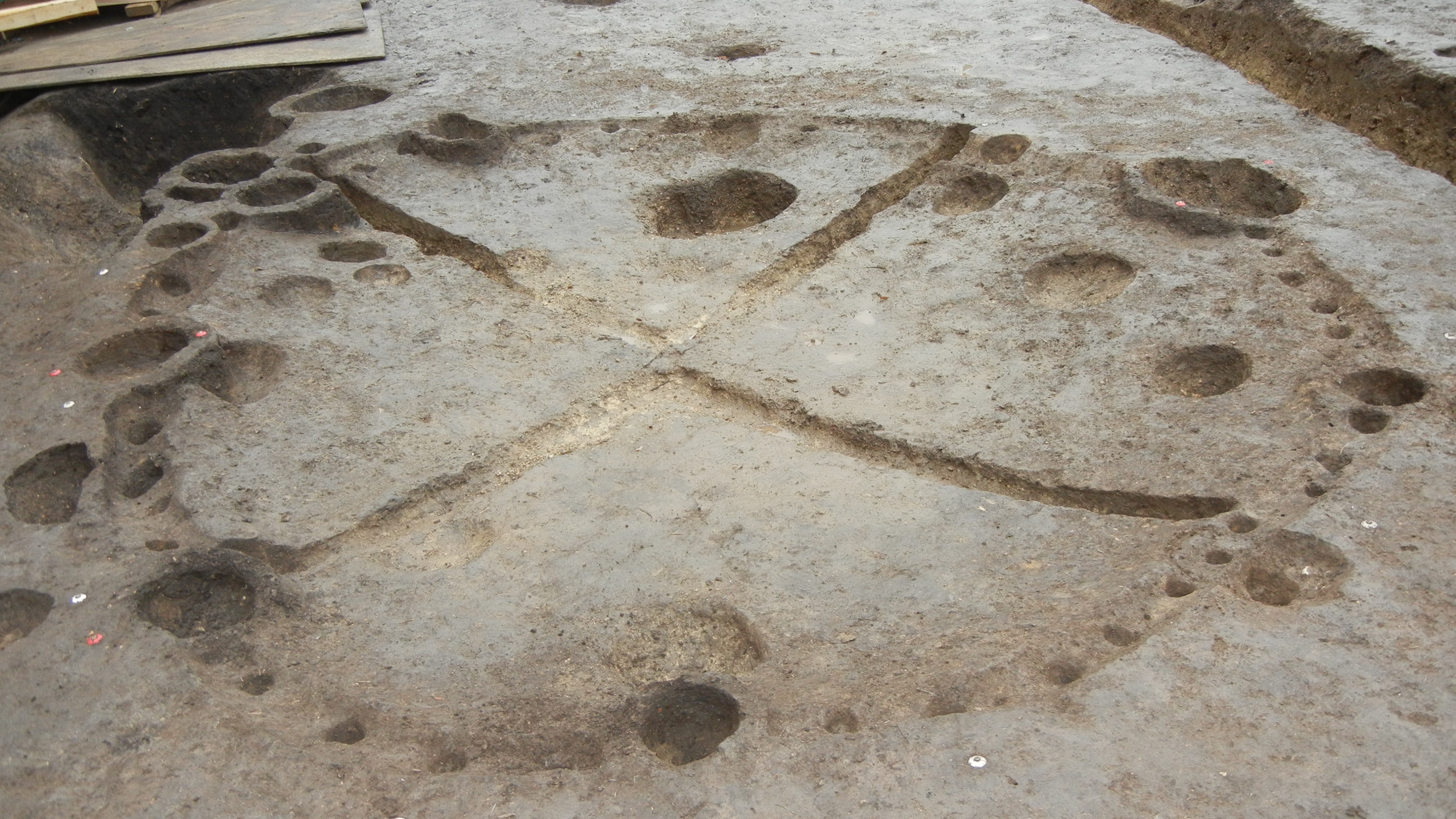 愛知県豊橋市西側北遺跡、縄文時代の竪穴式住居跡。2016年11月27日の現地説明会において撮影。